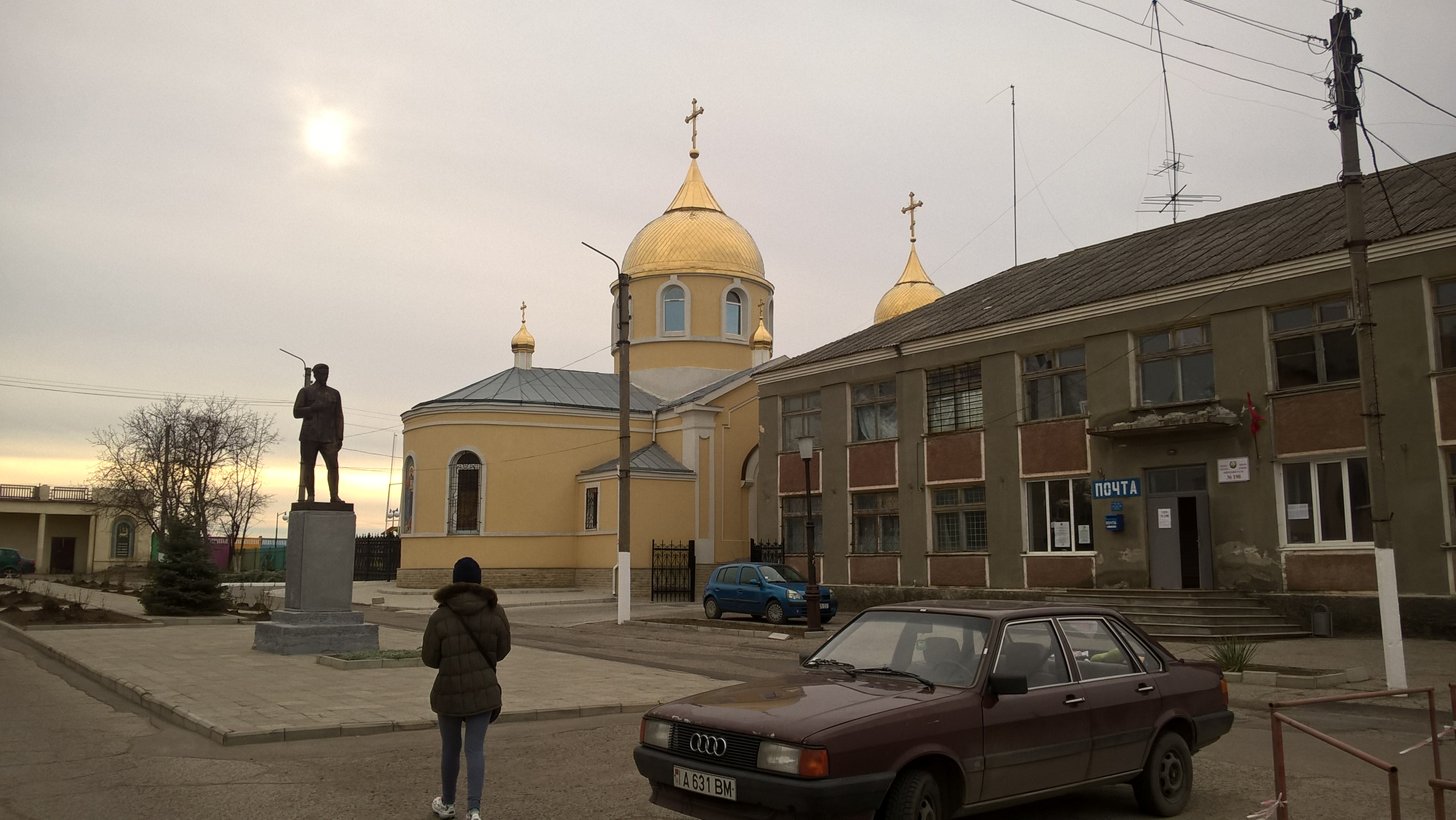 Centrum wsi Sucleia z pomnikiem Jakowa Swierdłowa i cerkwią św. Dymitra